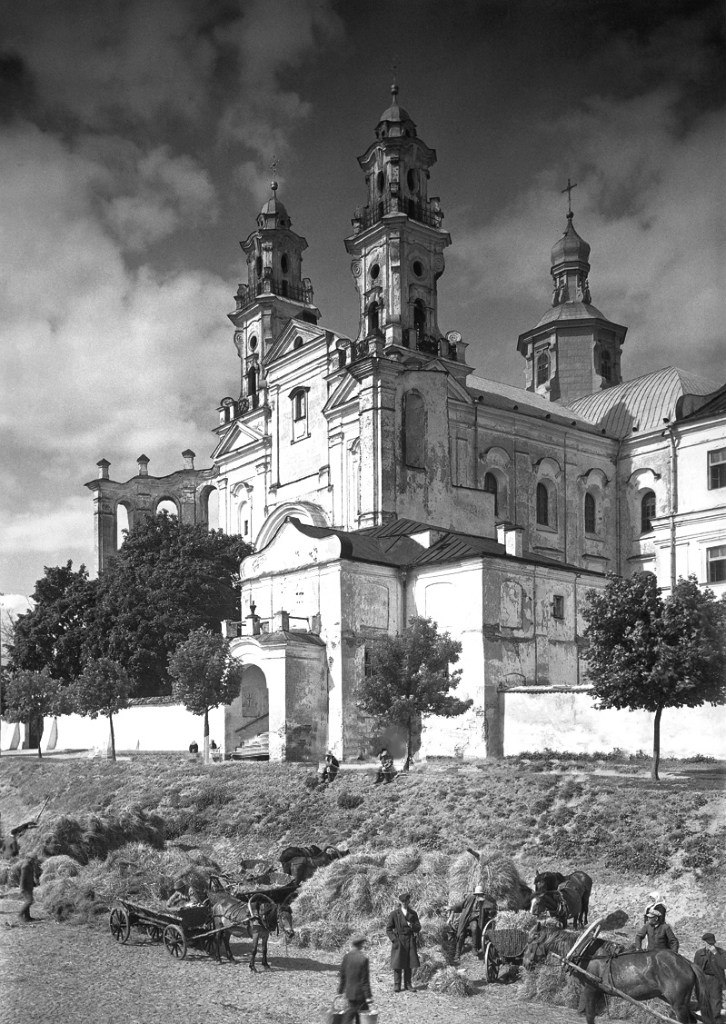 Беларуская (тарашкевіца): Пінск (Pinsk), рог вуліцы Набярэжная (vulica Nabiarežnaja) і пляцу Рынку (plac Rynak). Касьцёл Сьвятога Станіслава і калегіюм езуітаў